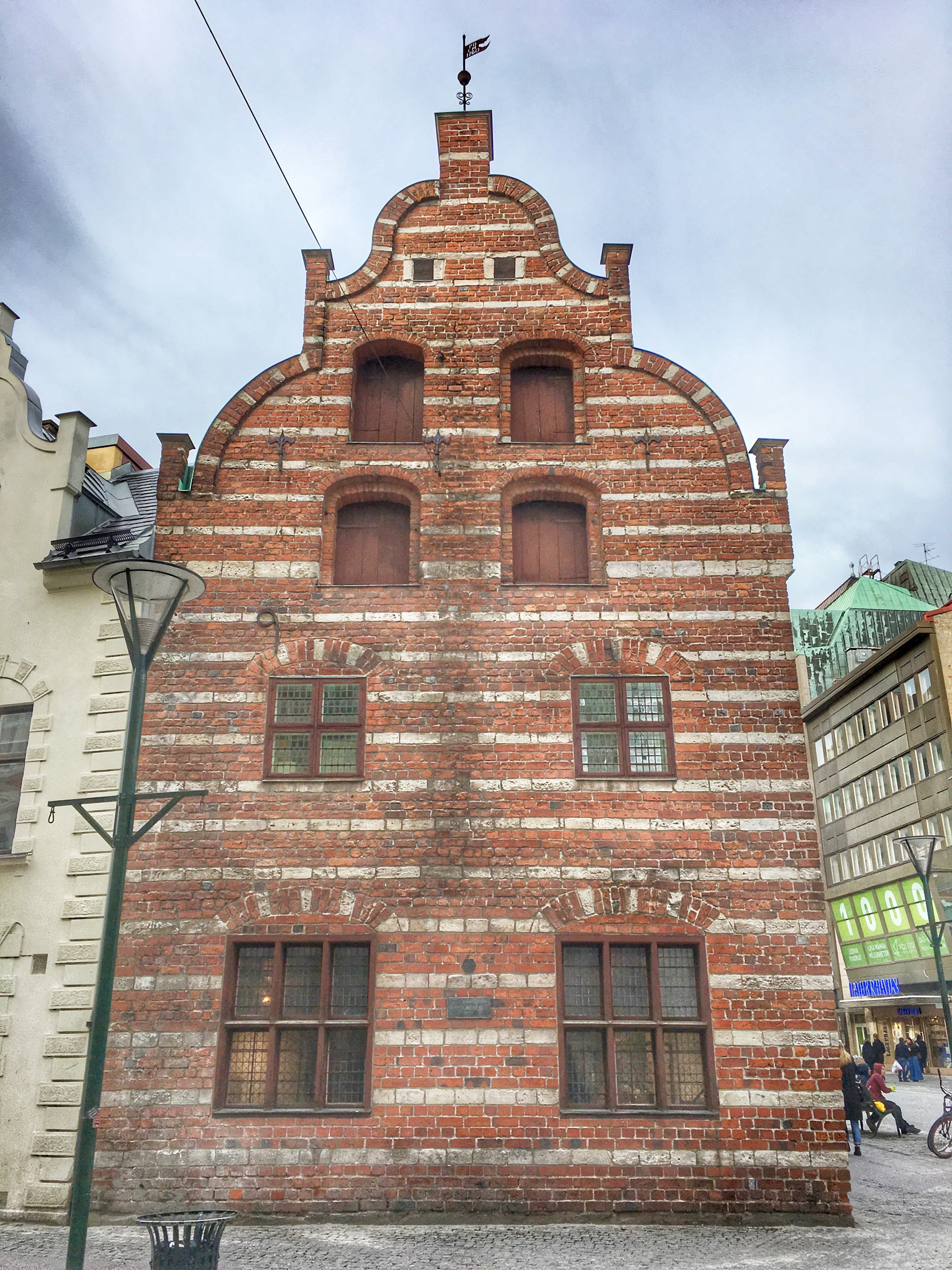 Flensburgske hus i Malmø, opført 1595 formentlig for rådmand Helmicke Ottersen